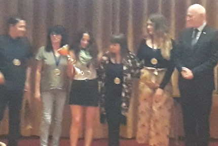 Ehrung des Siegerteams aus Kroatien, Mitropa Cup 2019 der Frauen in Radenci. Erste von links ist WGM Mirjana Medic.